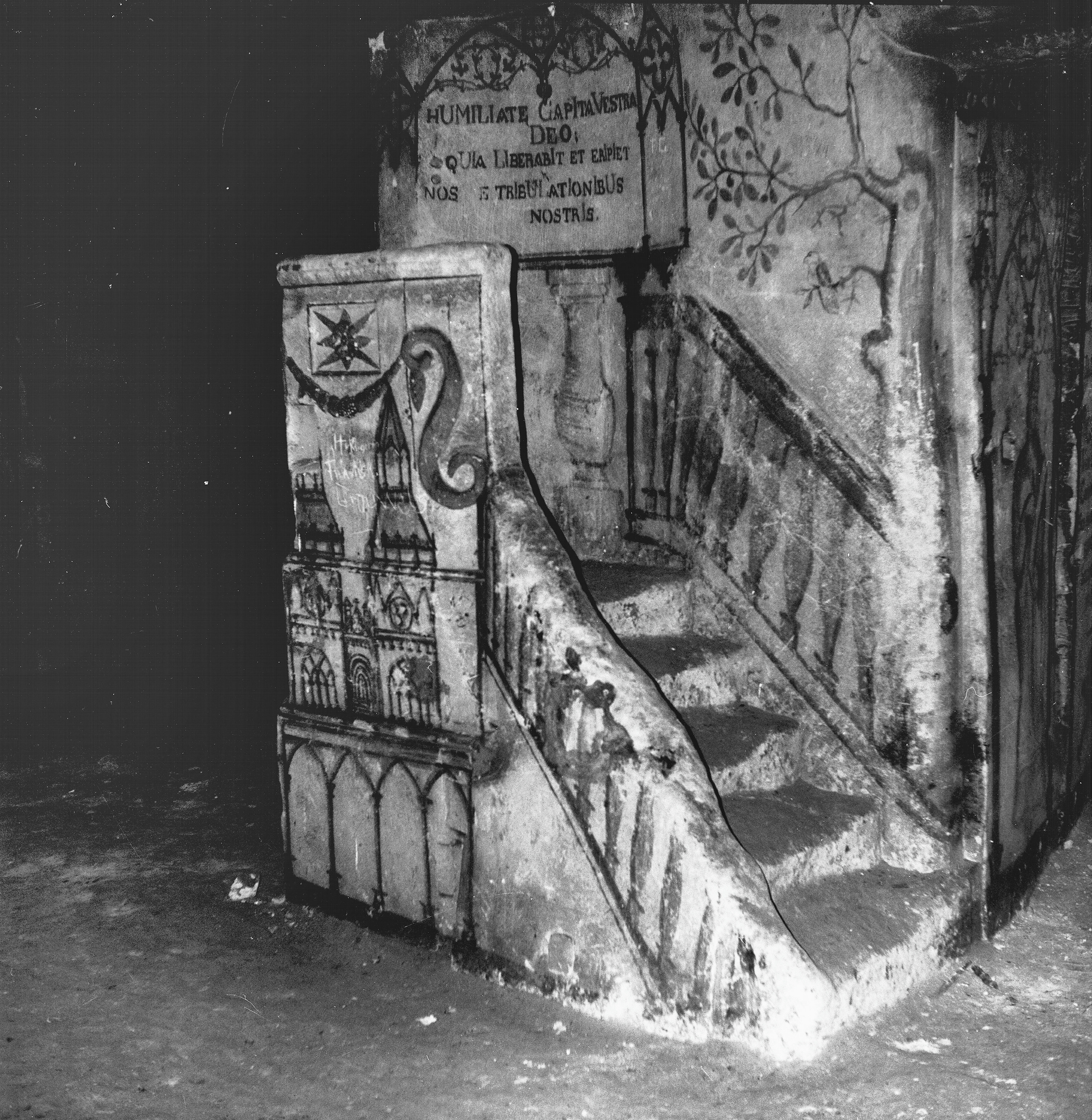 Diversen: Grot